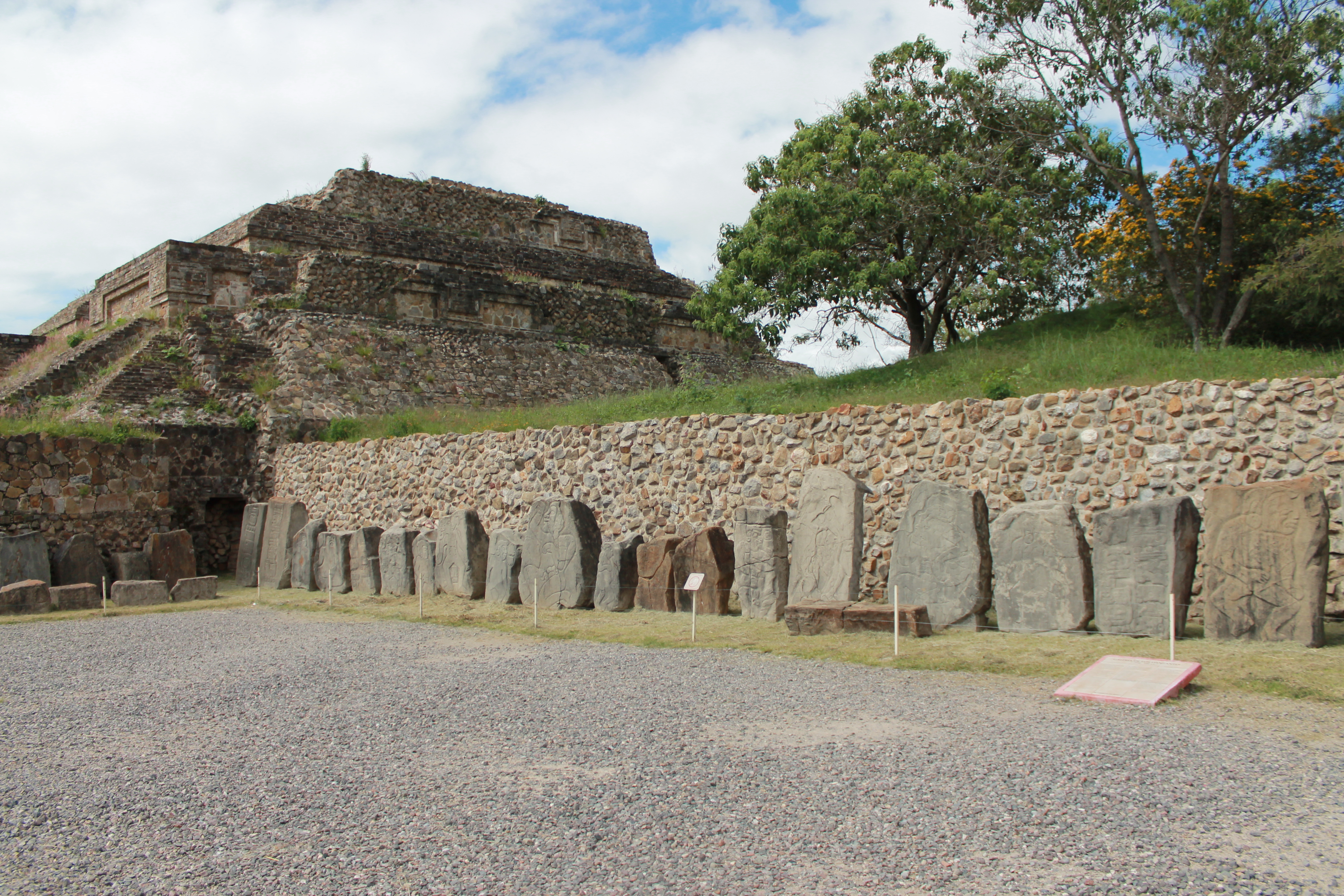 Se muestra una sección de la Galería de los Danzantes, adyacente al Edificio de los Danzantes. Se visualizan diversas piedras talladas con figuras humanas. En el fondo se divisa la edificación posterior del Sistema M.